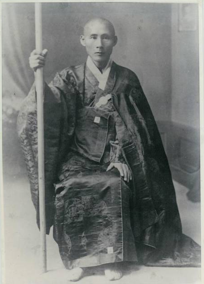 만공, 한국의 승려, 독립운동가